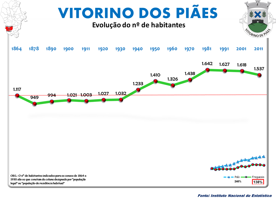 Censos 1864/2011